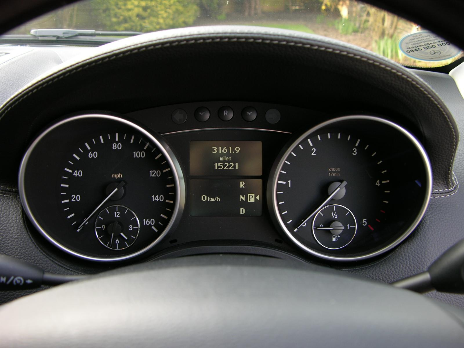 Mercedes Benz GL420 CDi 4-Matic